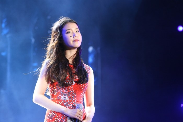 2012년 7월 3일 여수 엑스포 팝 페스티벌에서 아이유.